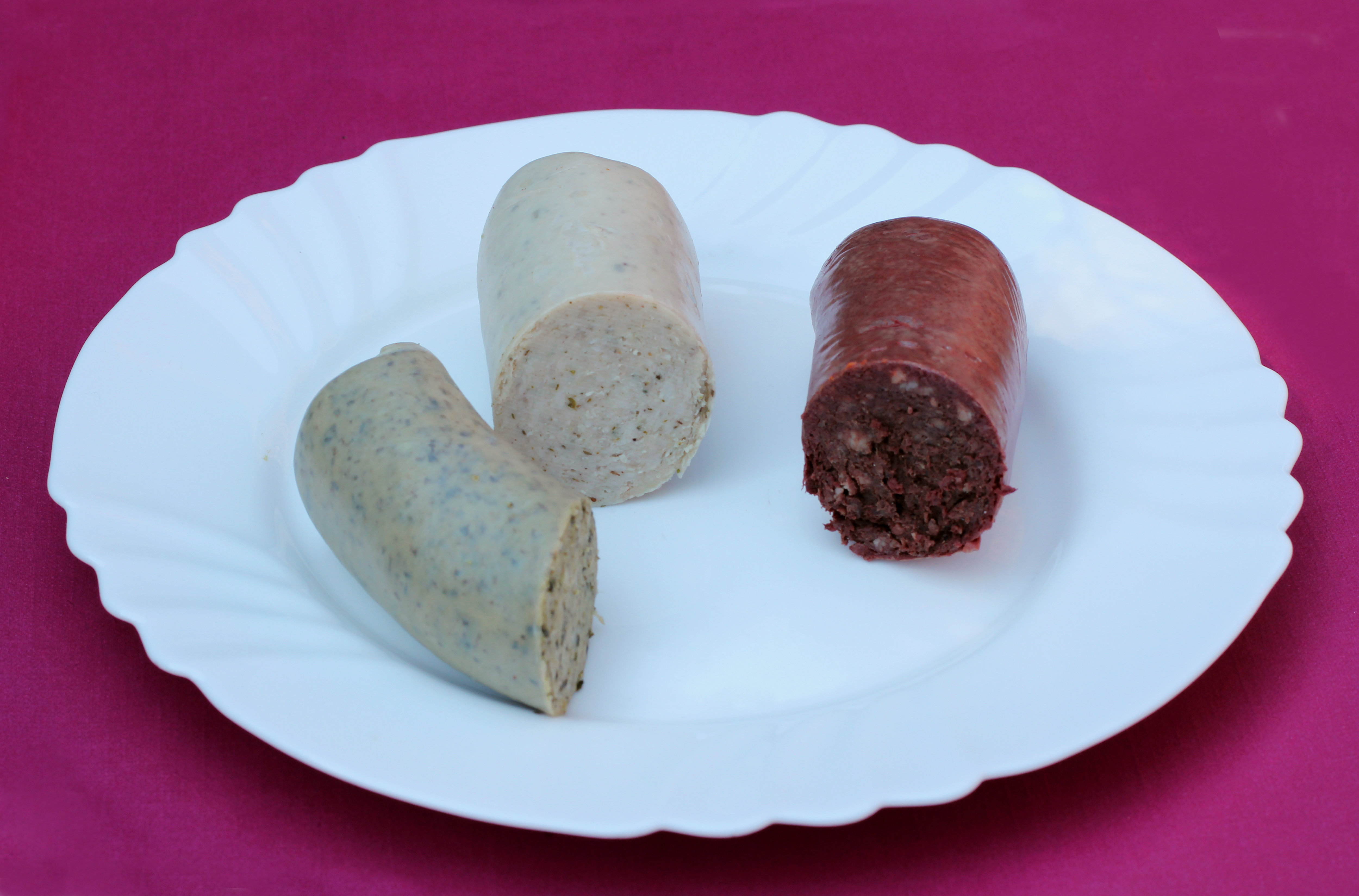 Assiette de boudin constituée de trois morceaux de boudin blanc, noir au lard et d'un boudin blanc au chou.